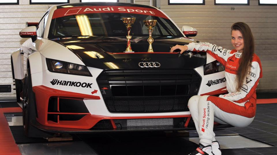 Vivien Keszthelyi mit ihrem Audi TT Cup Rennwagen im 2016